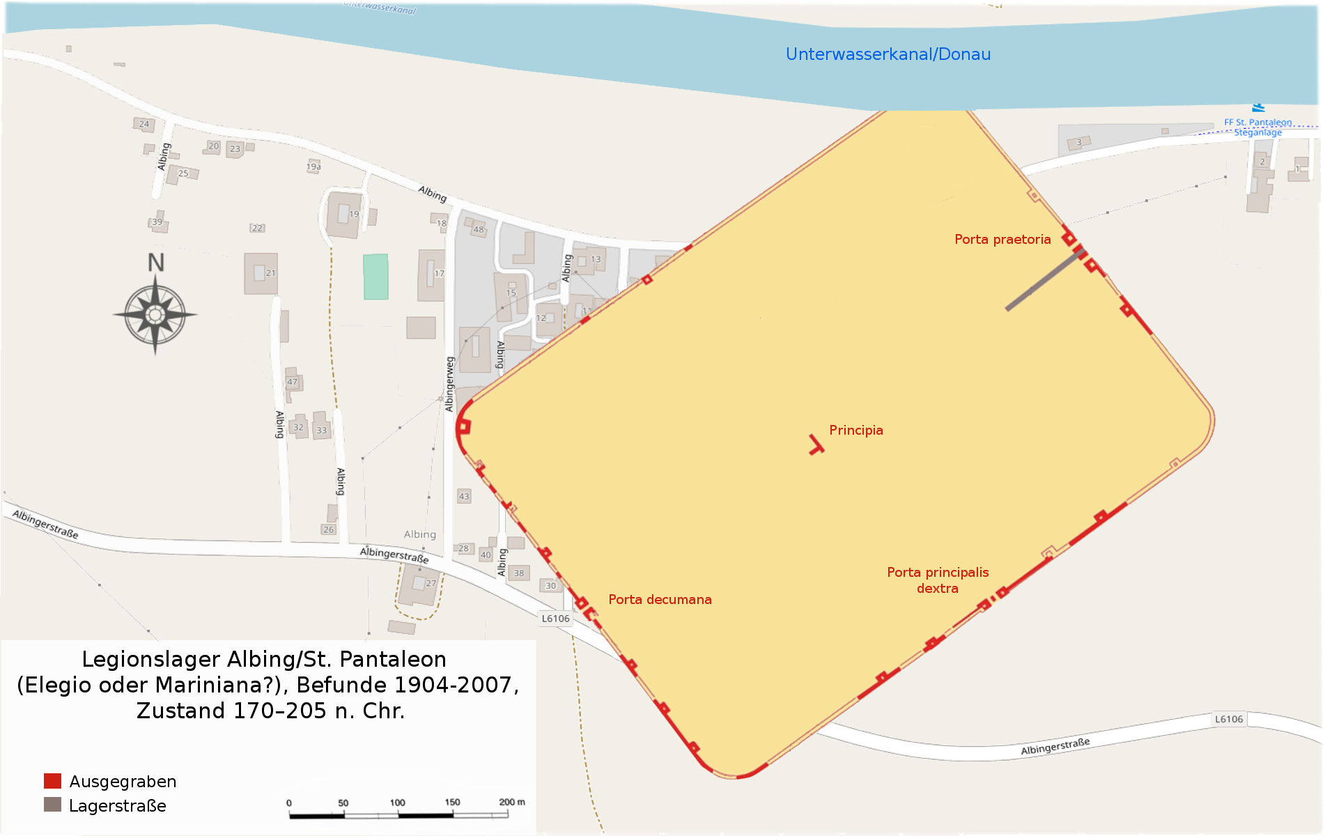 Grabungsplan des Legionslager Albing nach den Befunden von 1904-2007.